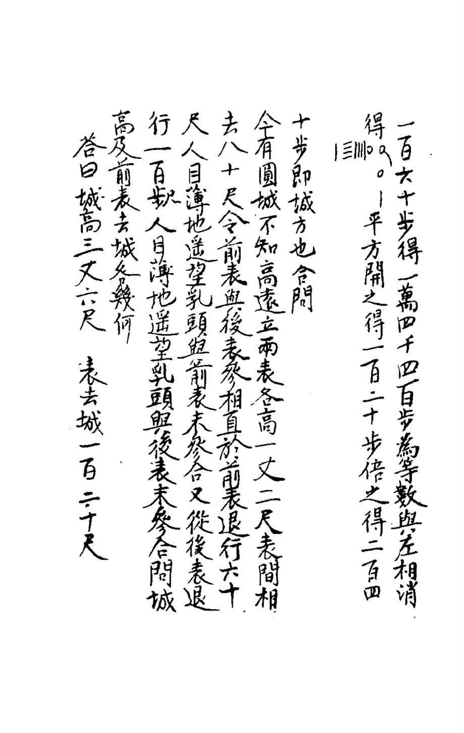 今有圆城不知高远